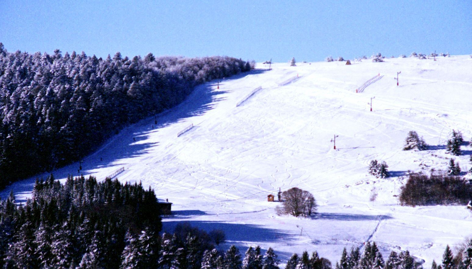 Pistes d'alpin de la station de Prabouré Saint-Anthème